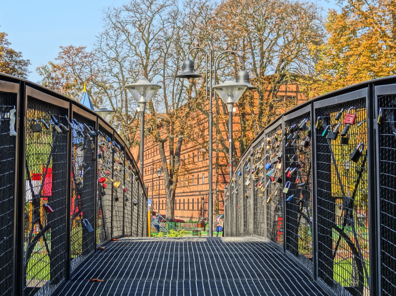 Kładka dla pieszych nad Młynówką w rejonie Wenecji Bydgoskiej, prowadząca z Wyspy Młyńskiej do ulicy Długiej w Bydgoszczy